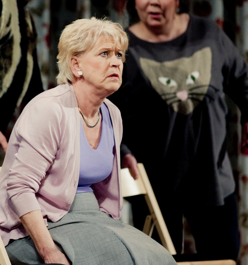 Kais Adlas lavastuses 'Kalendritüdrukud'. Fotograaf Gabriela Liivamägi.